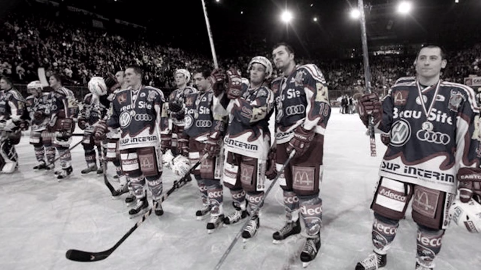 Finale de la coupe de France de hockey sur glace 2007, première édition au Palais Omnisports de Paris Bercy - Équipe des Dauphins d'Épinal après le match.